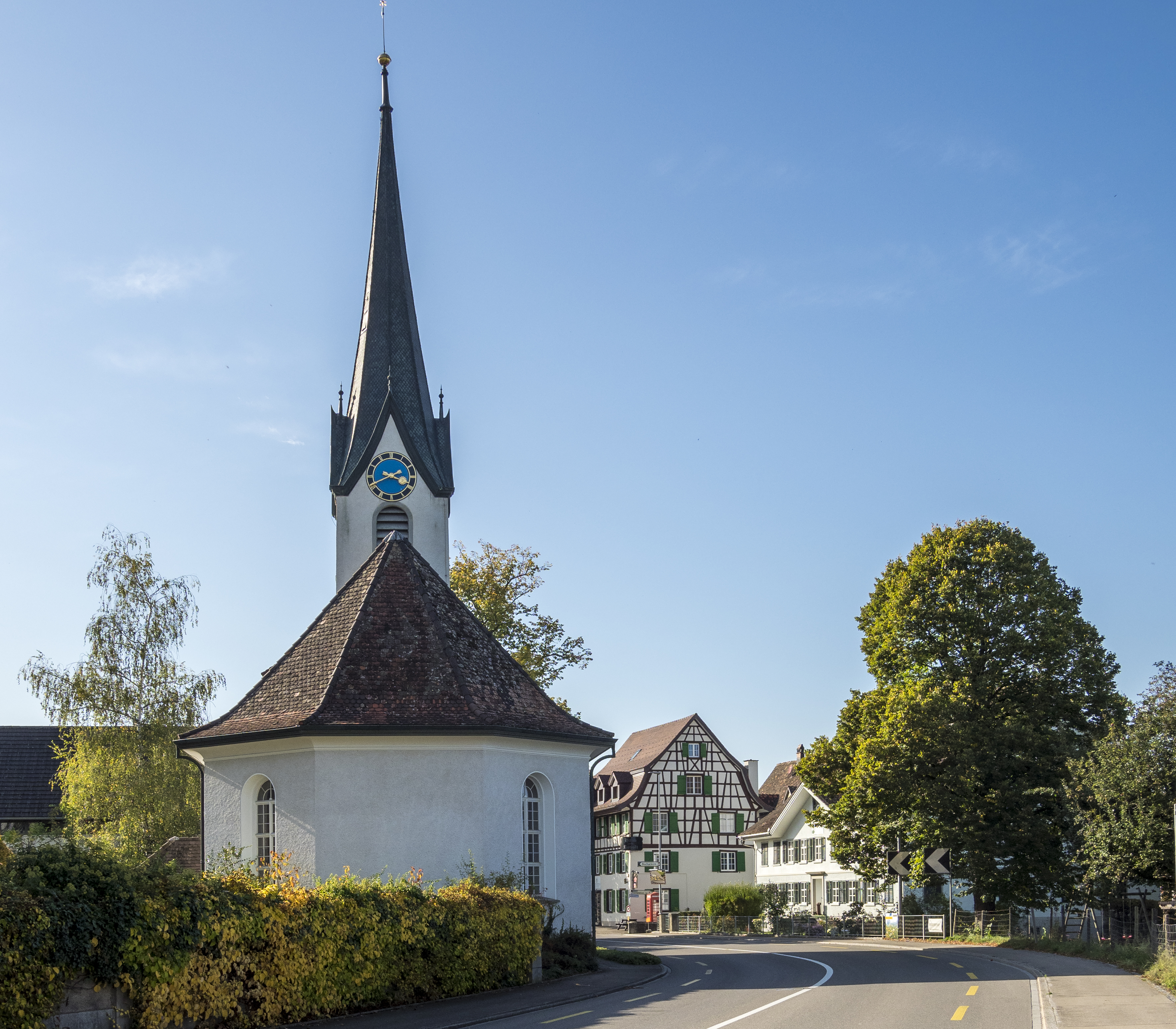 Erlen TG: Hauptstrasse mit Ev.-Ref. Kirche, erbaut 1764.